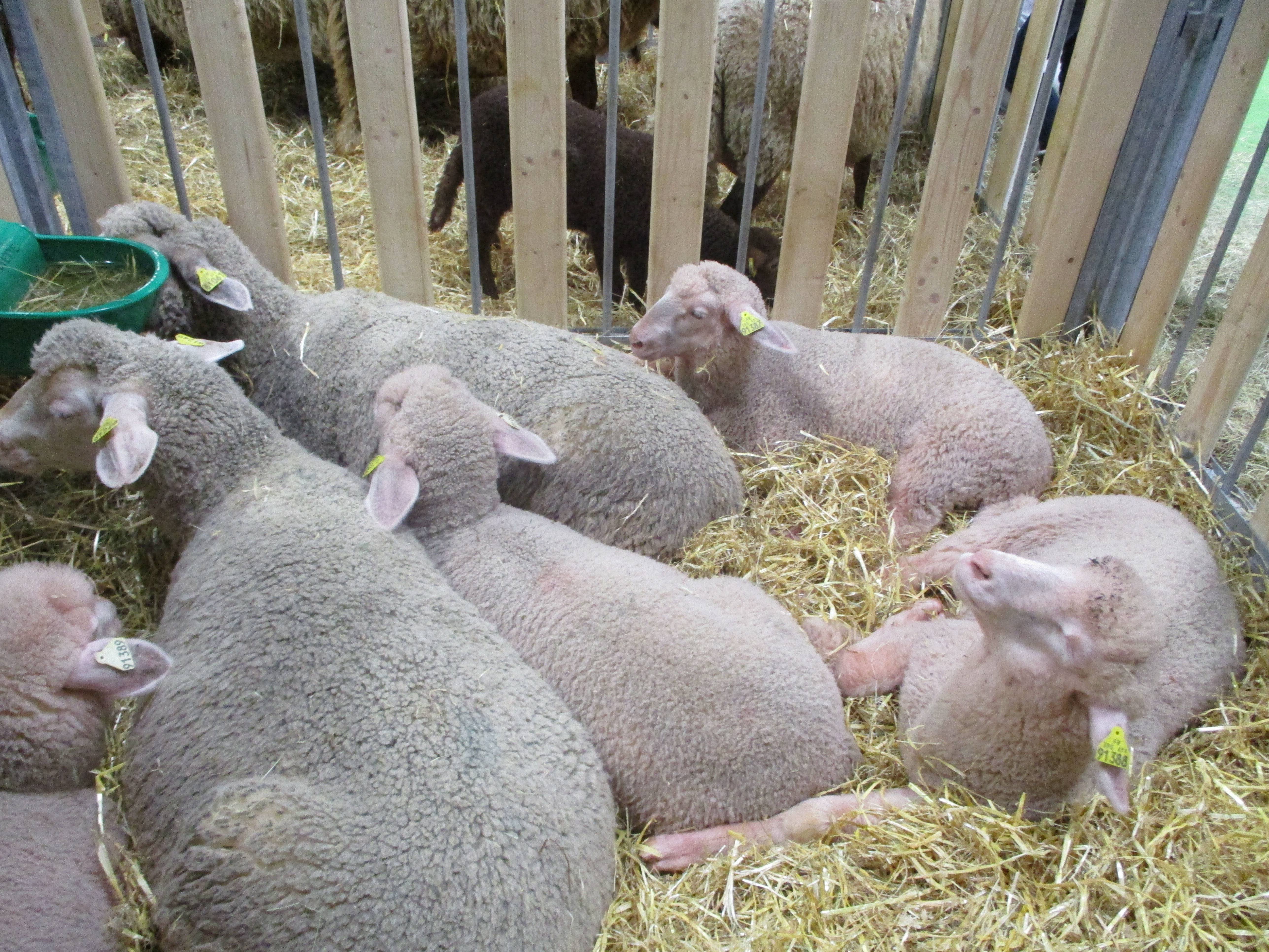 Brebis charmoises au salon de l'agriculture de Paris 2019.